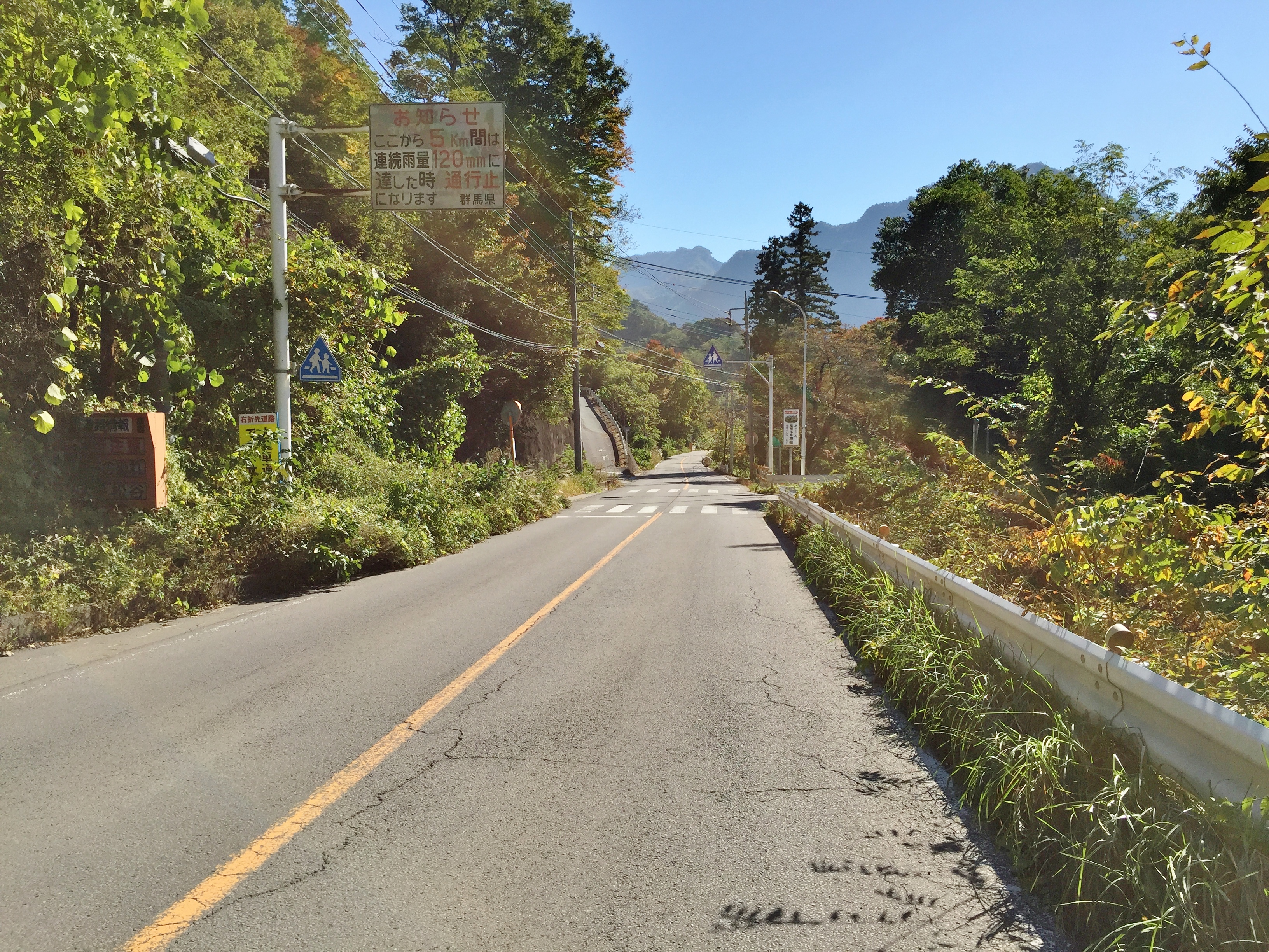 国道145号 長野原町 林